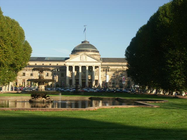 Das Kurhaus Wiesbaden Frontansicht.